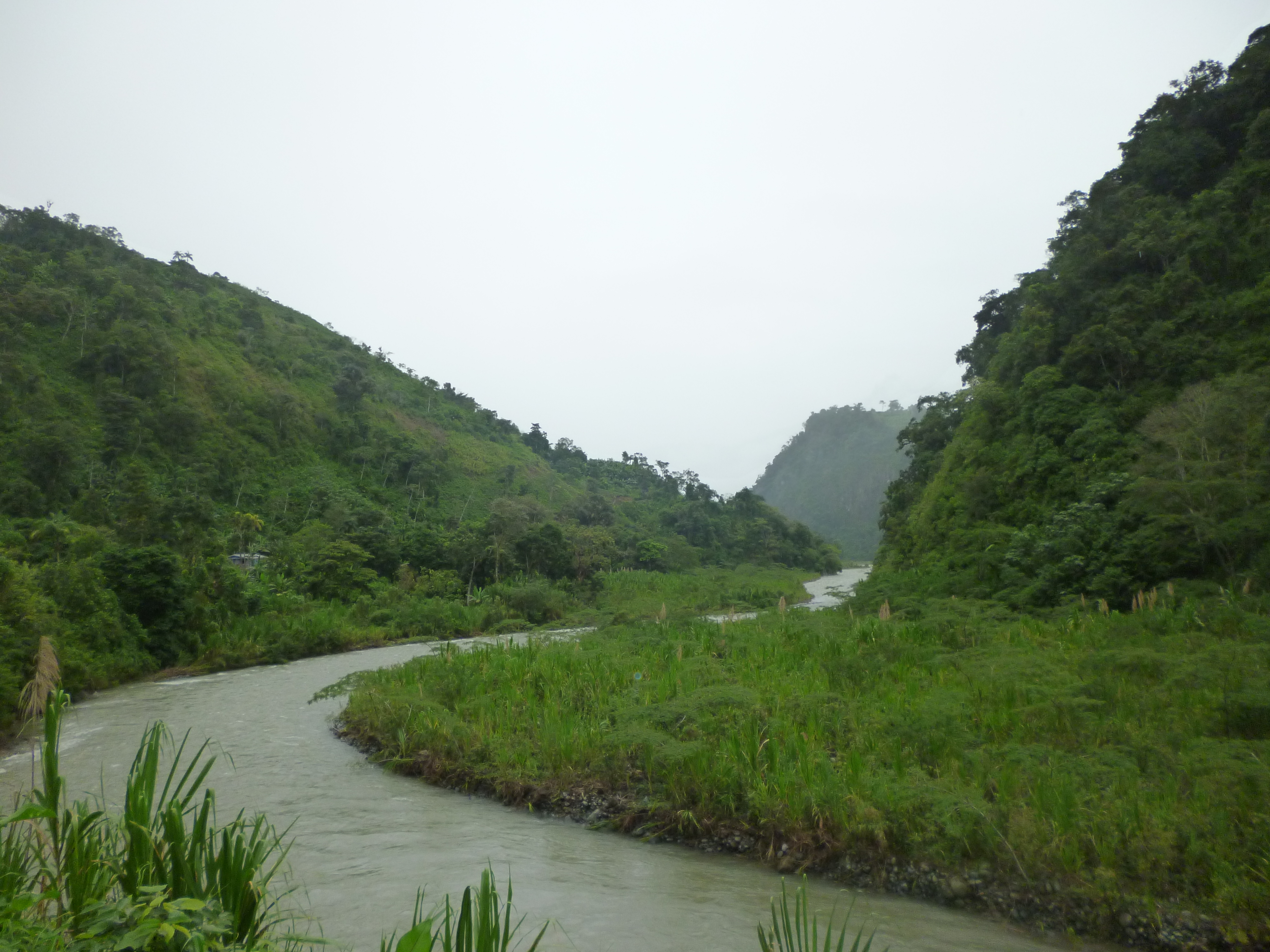 Río Chirripó a la altura de Roca Quemada.